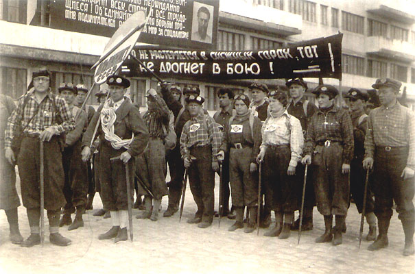 Альпинисты на первомайской демонстрации в 1936 году. Надпись на транспаранте: "Кто не растеряется в снежных горах, тот не дрогнет в бою"